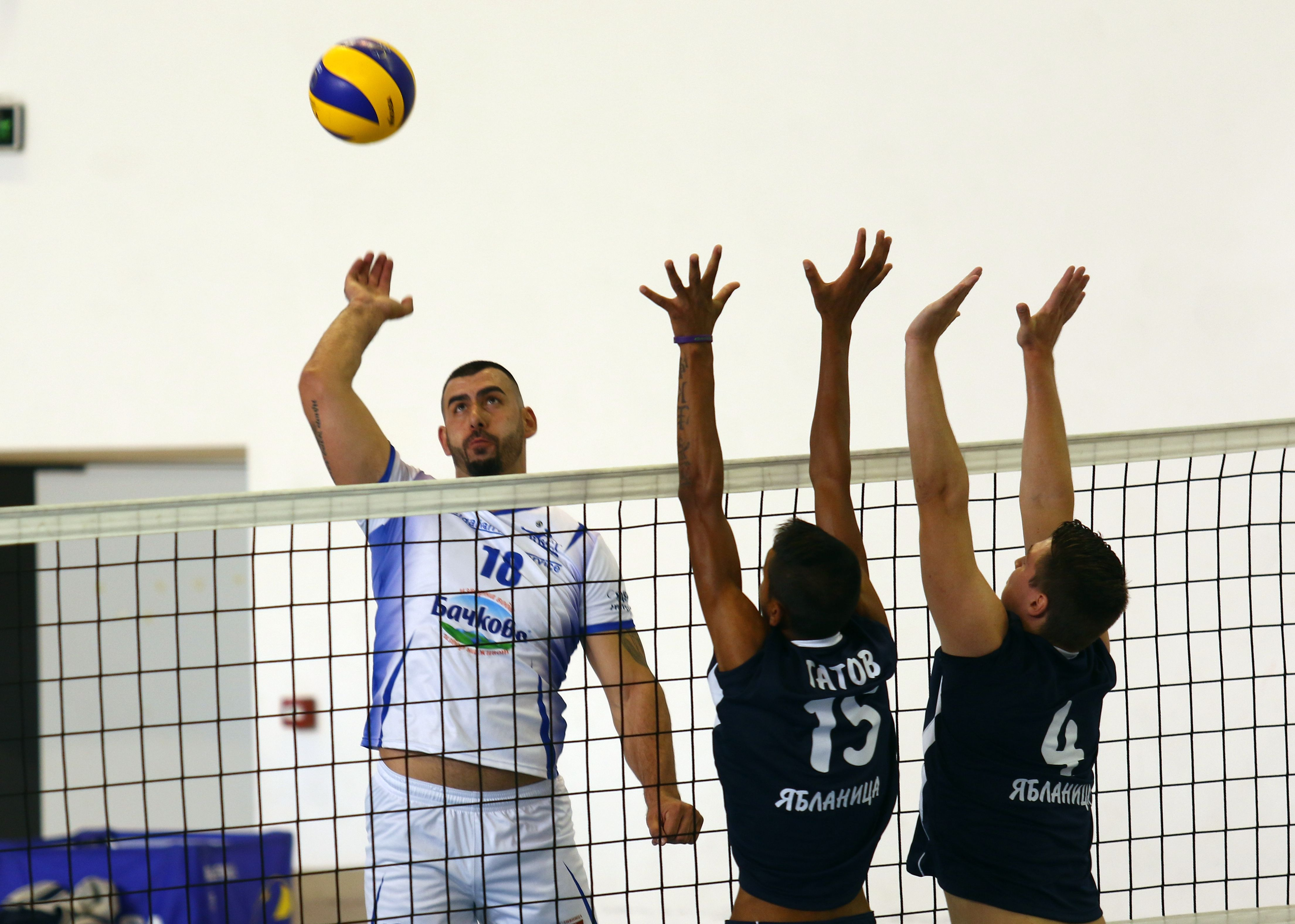 Момент от волейболния мач ВК Сливнишки герой - ВК Изгрев 3-0, 21-10-2017, зала Арена Сливница